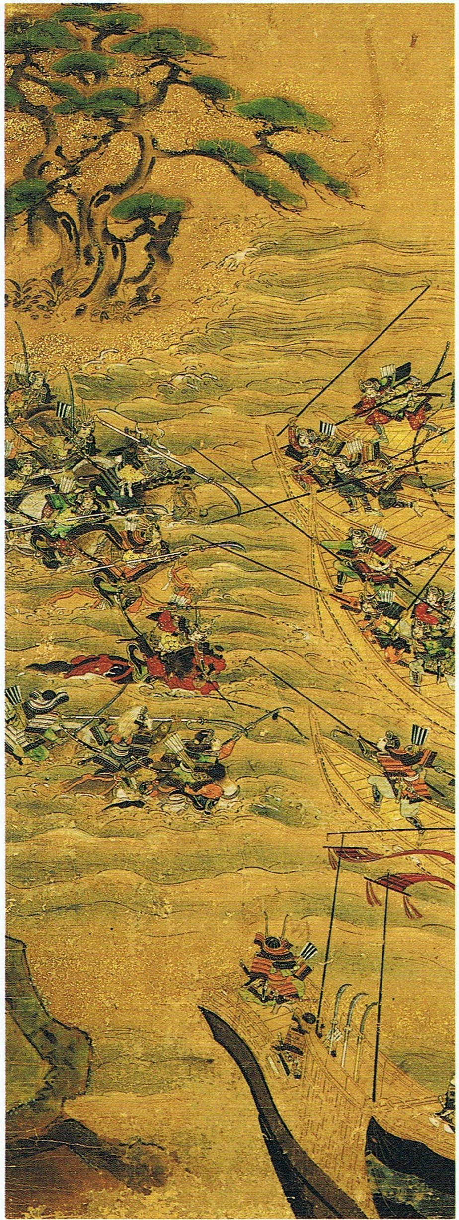 第八巻「屋島合戦」義経の弓流し